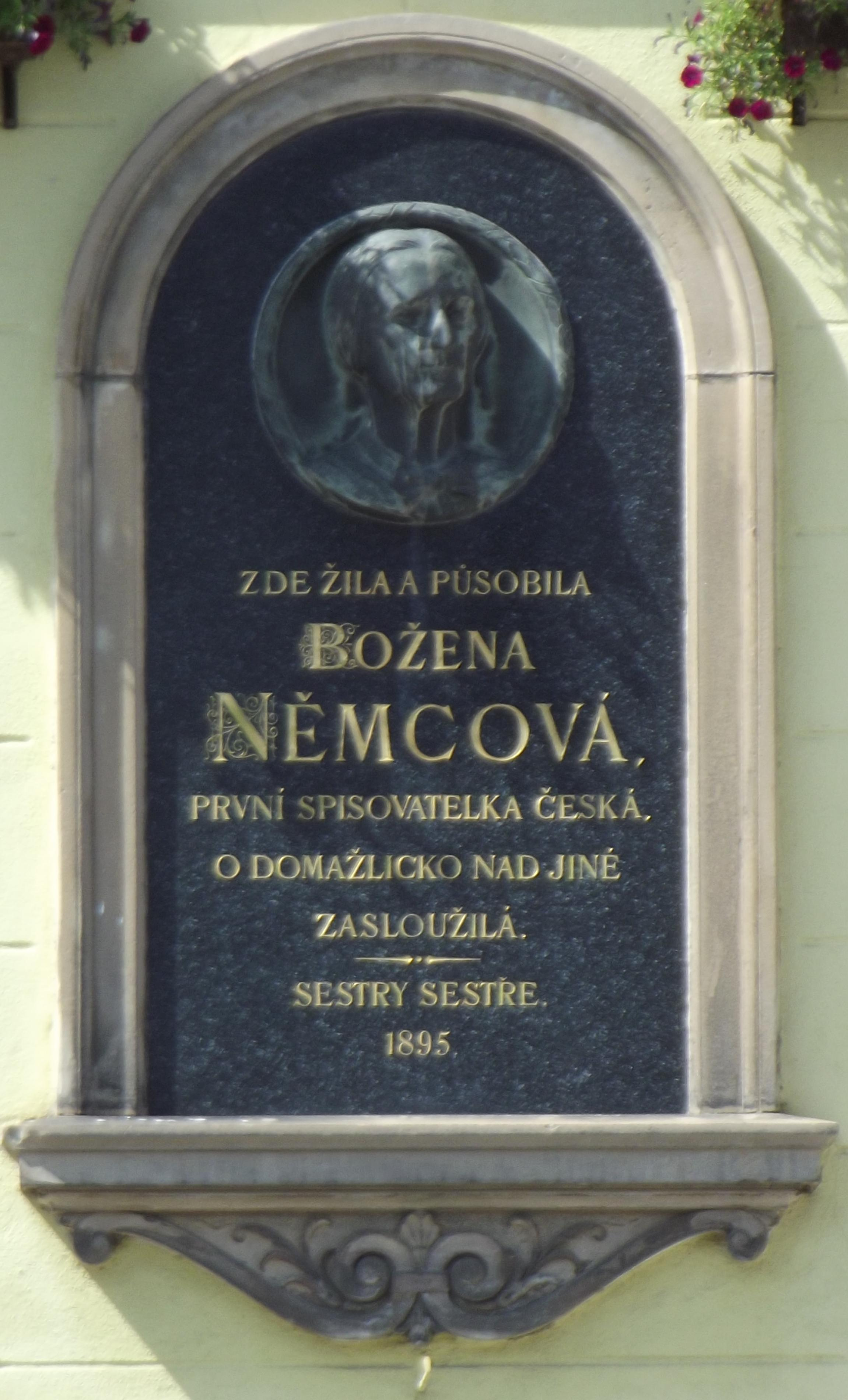 Památník Boženy Němcové na fasádě domu čp. 120 na rohu ulice Boženy Němcové a náměstí Míru v Domažlicích.